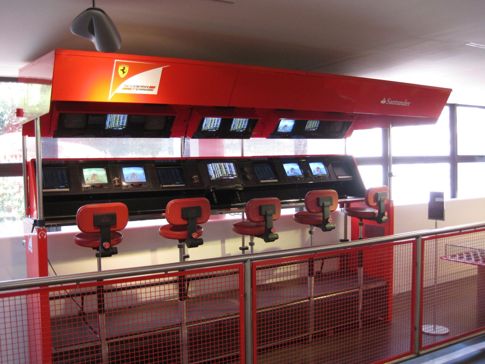 Collections of the Galleria Ferrari